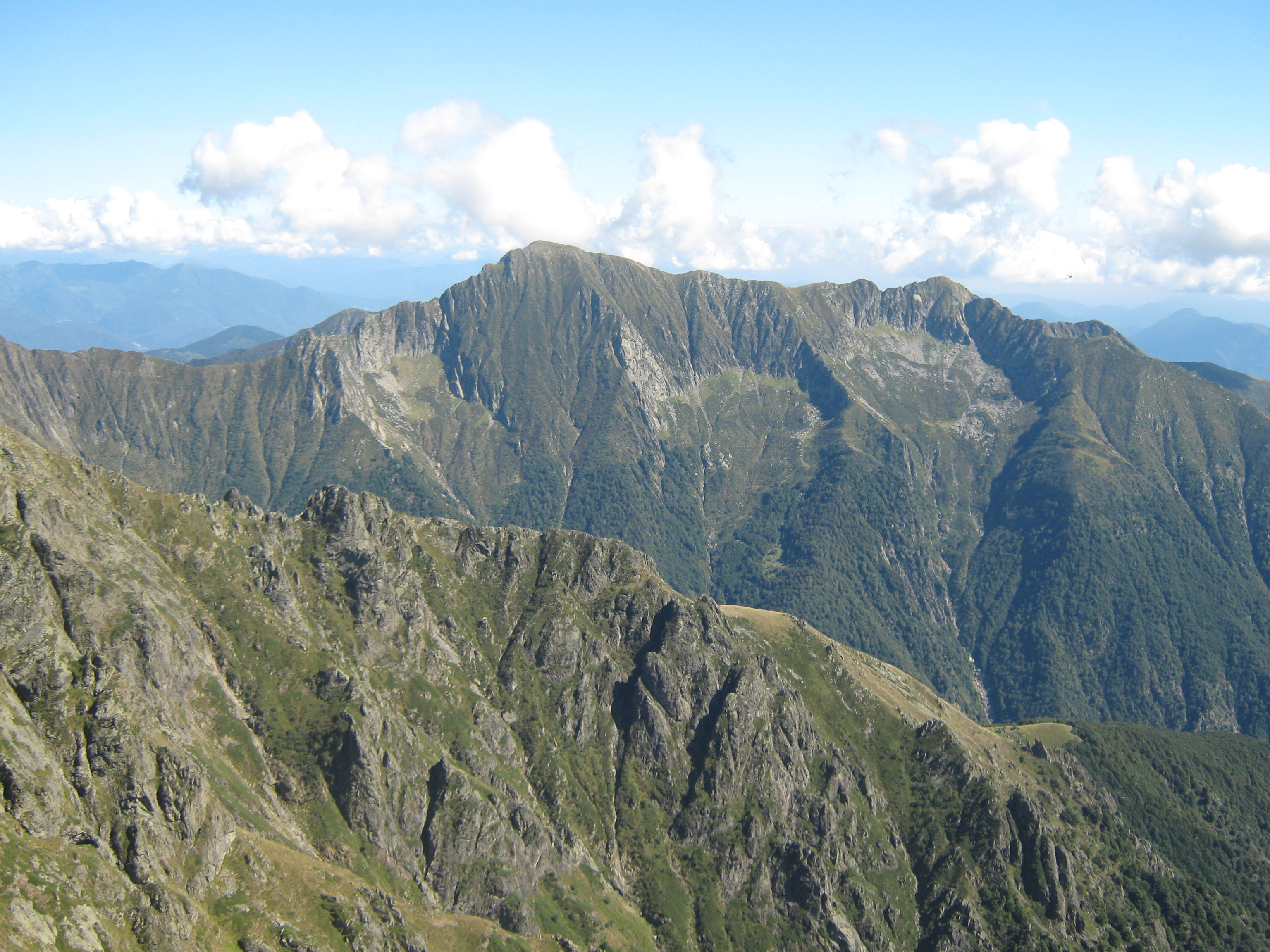 Monte Zeda visto dalla Cima della LaurascaAlemannisch: Monte Zeda von Cima della LaurascaLumbaart: Munt Zeda vist da la Laurasca